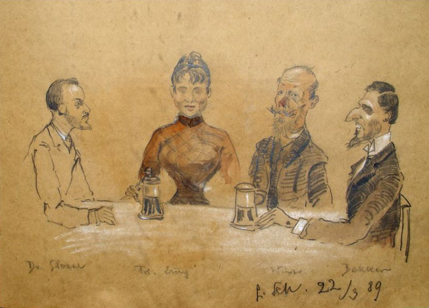 "Winfried (von Miller). Emmy (Marie von Miller). (Hendrik) Bakker". Aquarellierte Bleistiftzeichnung auf braunem Papier von Ludwig Scheuermann, ca. 34 × 25 cm. Unterhalb der Darstellung signiert und datiert: 22.3.(18)89. Blatt aus dem Gästebuch der Münchner Mittwochsgesellschaft.